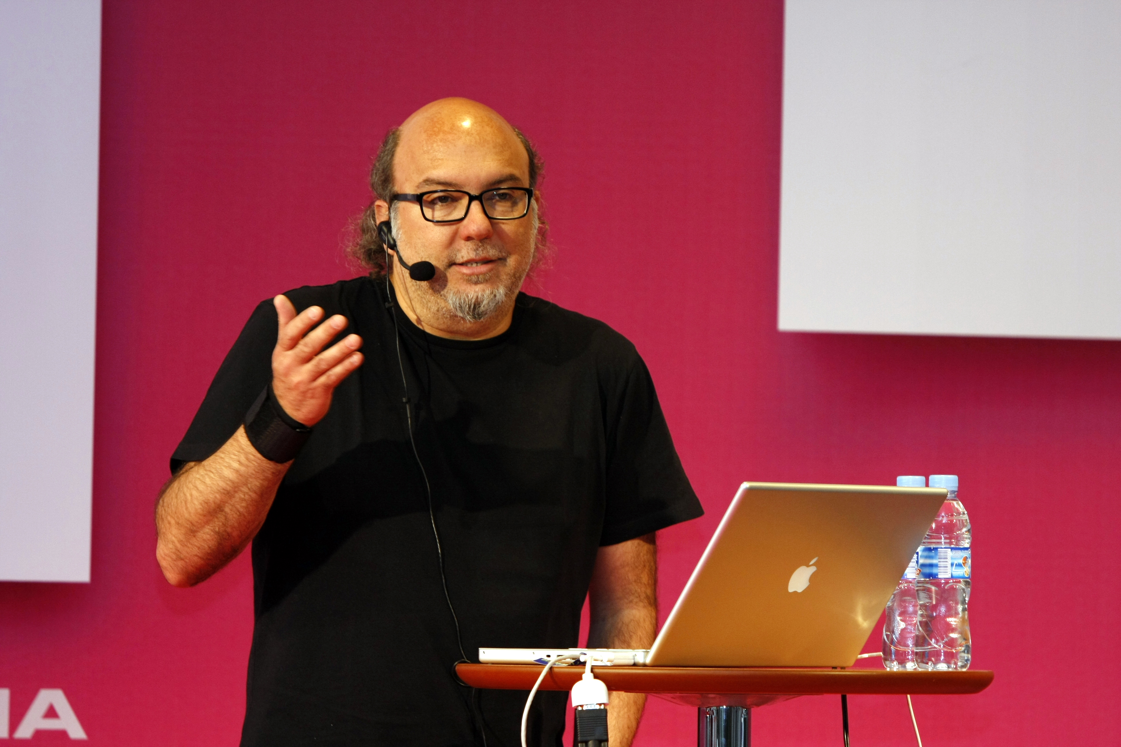 Toni Segarra Alegre: Creatividad Digital